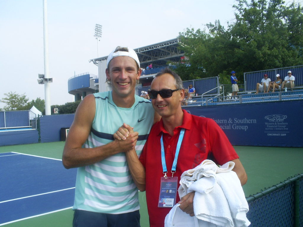 Lukasz Kubot tuz po wygranej w 1 rundzie eliminacji do turnieju glownego ,ATP Cincinnati,Ohio